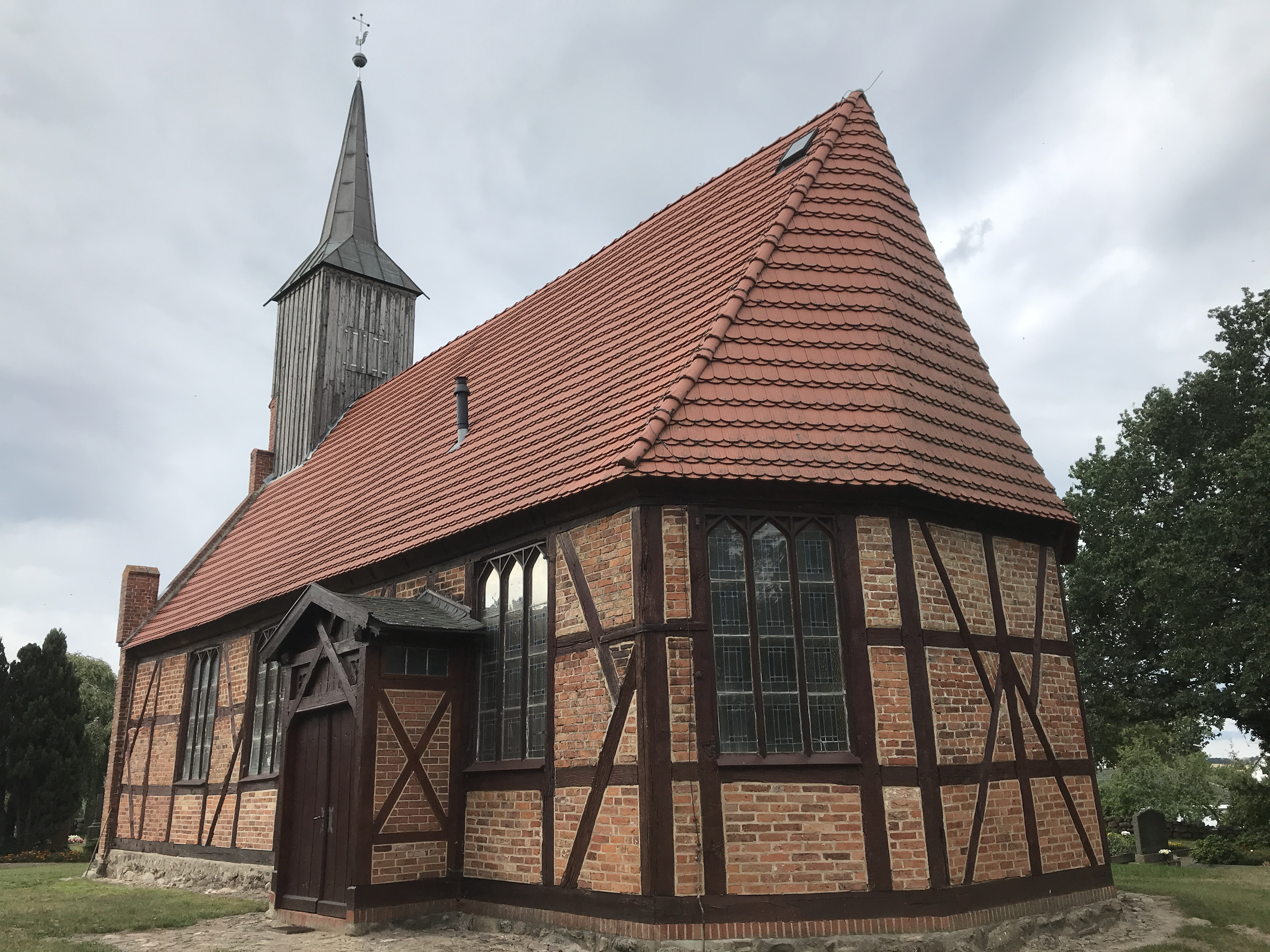 Die Dorfkirche in Kuhlrade der Stadt Marlow entstand im 18. Jahrhundert. Im Innern befindet sich eine bauzeitliche und schlichte Kirchenausstattung.